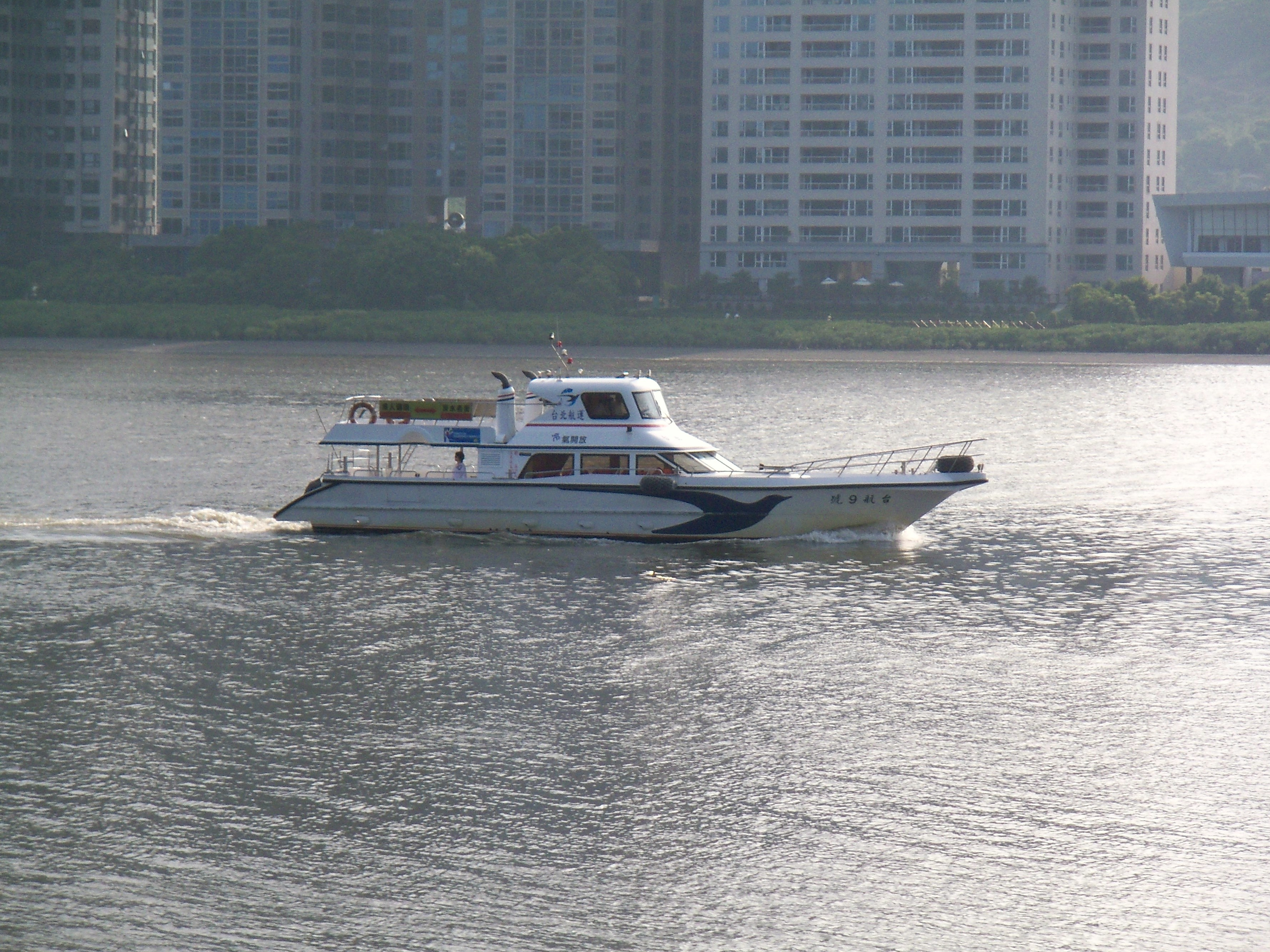 中文（台灣）: 台北航運台航9號遊艇航行於淡水河，臺北縣淡水鎮竹圍土地公鼻攝影。